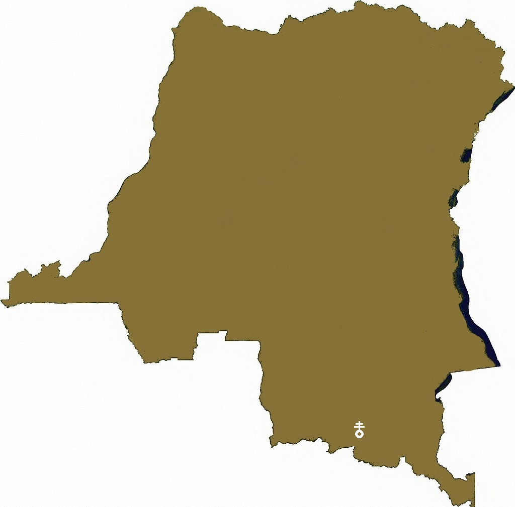 map congo